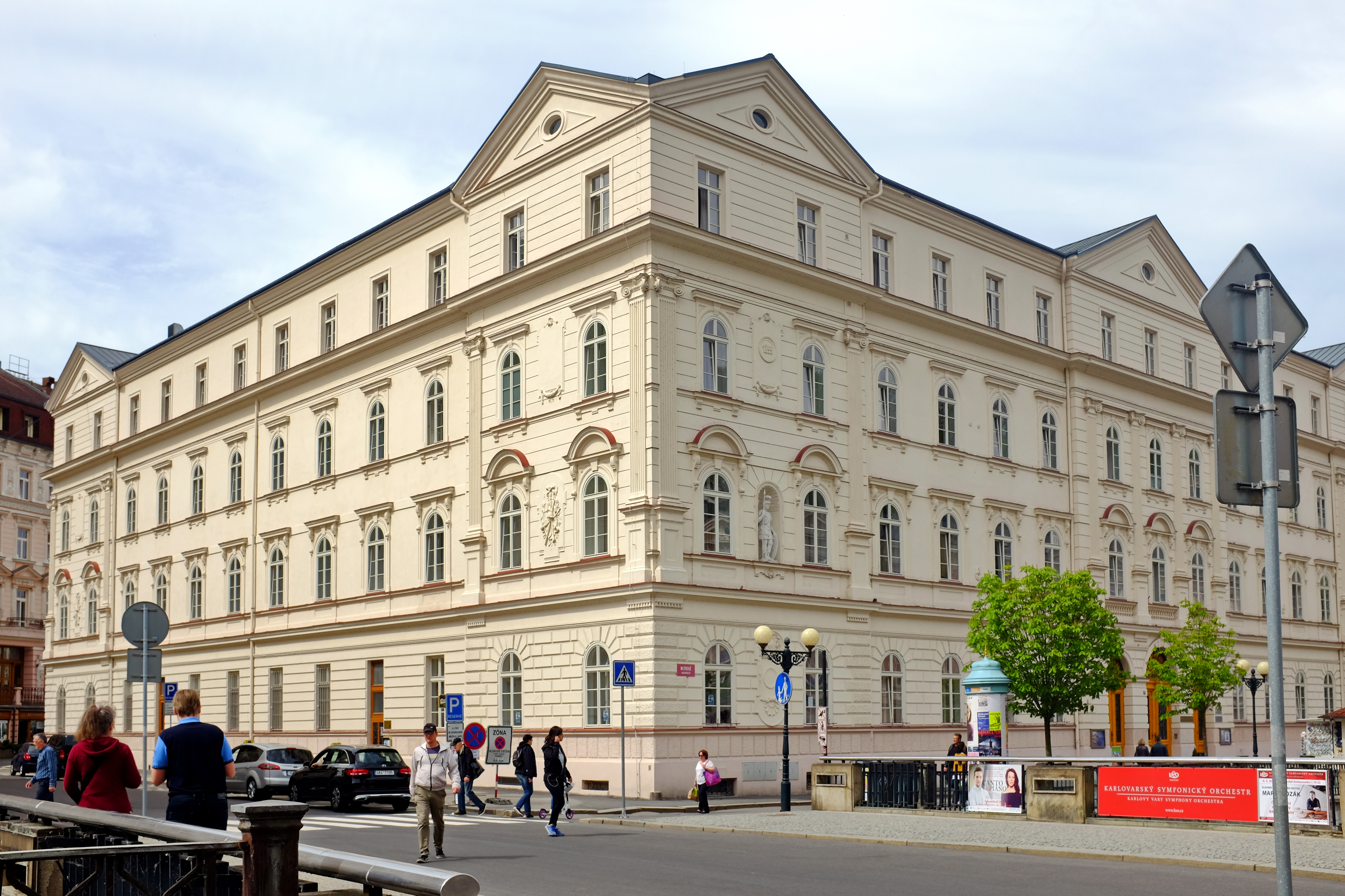 Vojenský lázeňský ústav, Mlýnské nábřeží 574/7, Karlovy Vary.